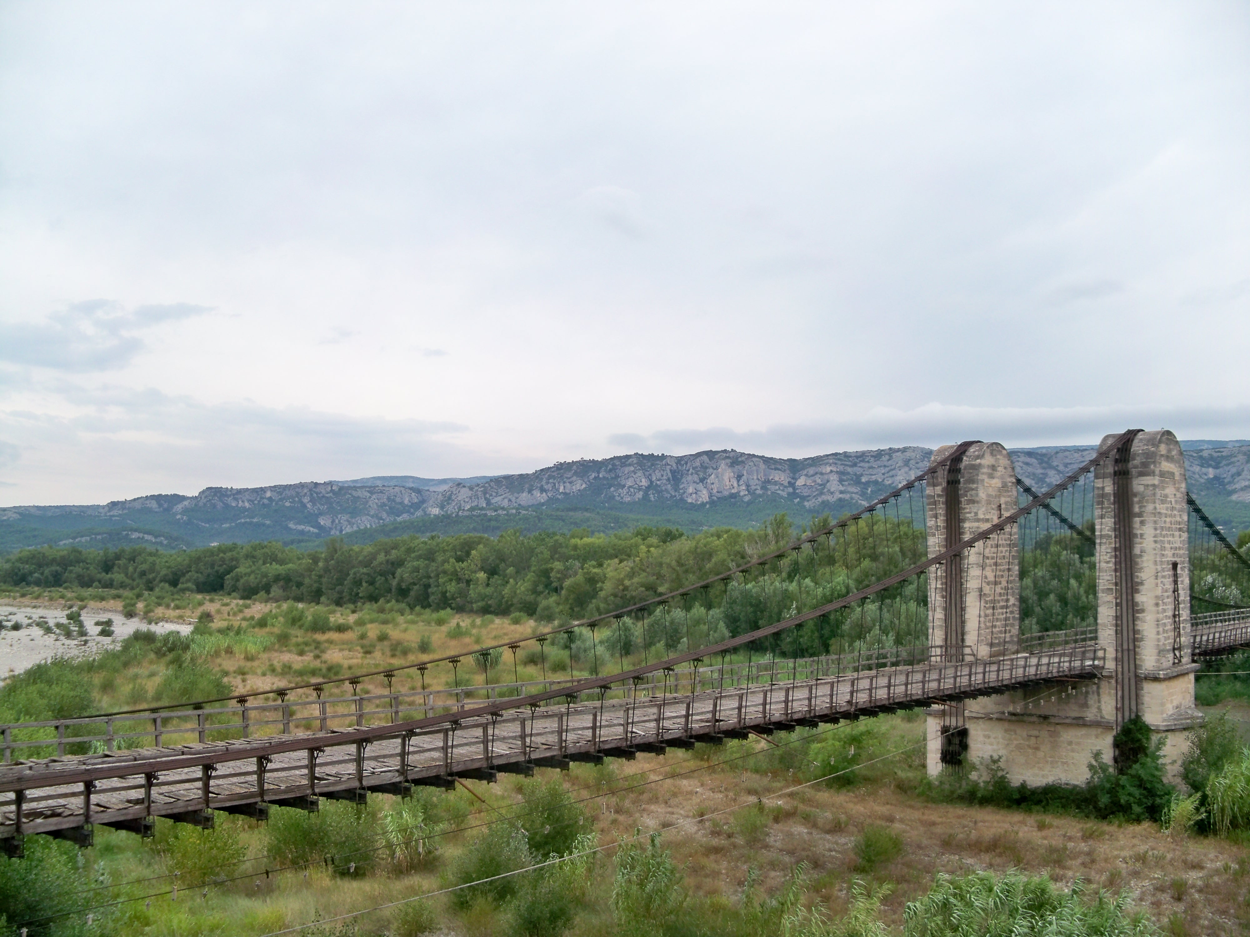 vue vers le Luberon depuis le pont suspendu sur la Durance entre Mallemort (Bouches-du-Rhône) et Mérindol (Vaucluse), France